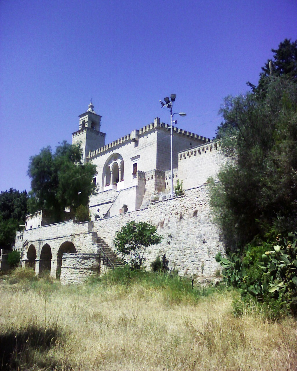 Santuario di Santa MAria della grotta - Modugno (bari)-Italy